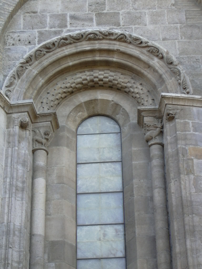 La Seo, ventana ábside